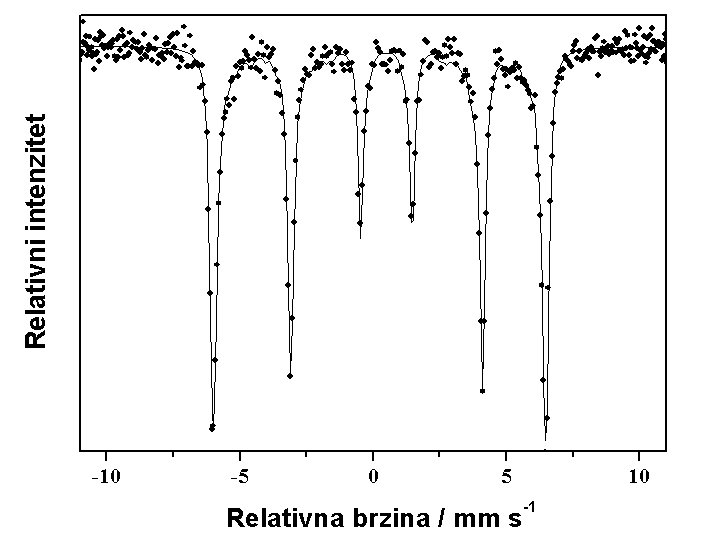 Mossbauerov spektar uzorka sintetičkog getita